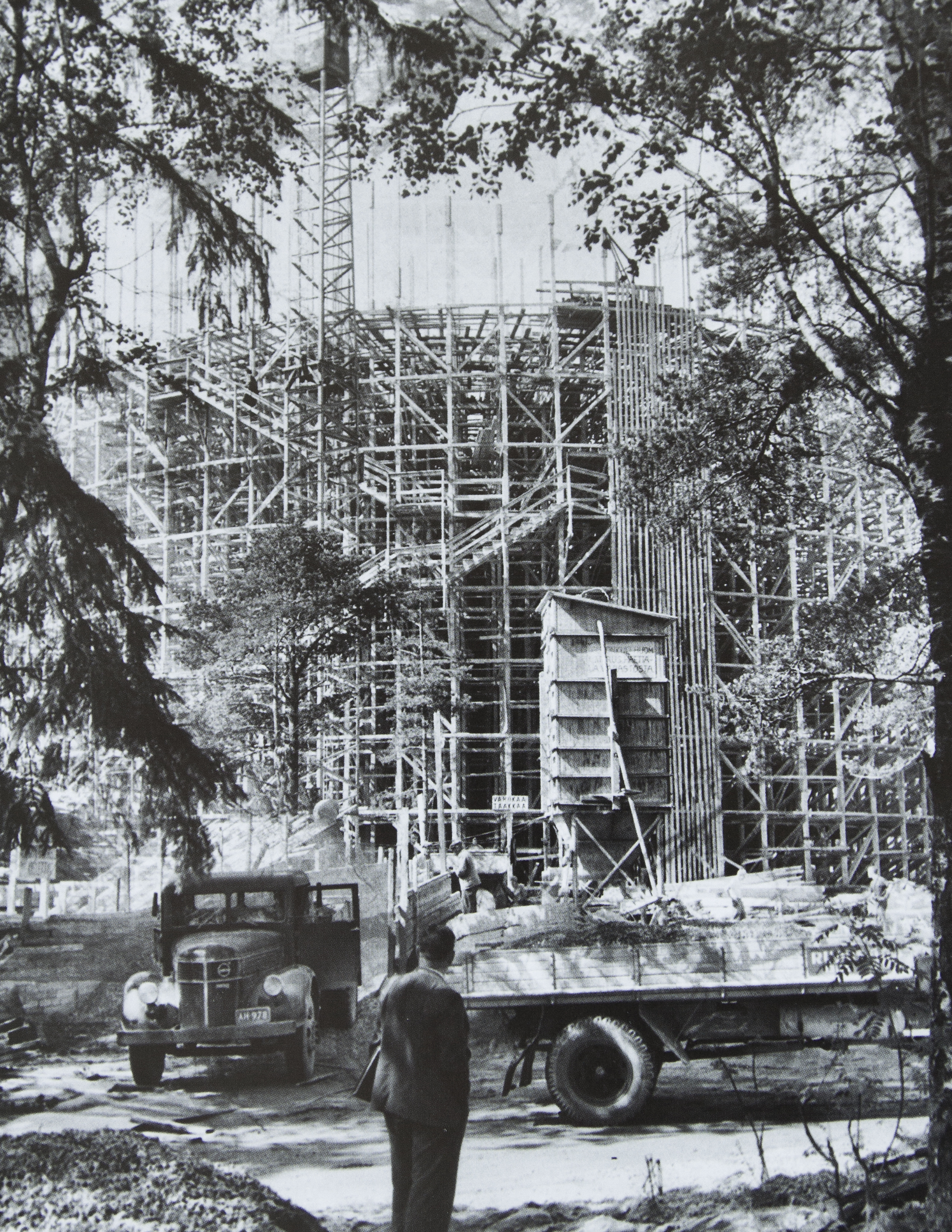 Lauttasaaren vesitornin rakennustyömaa kesällä 1958.